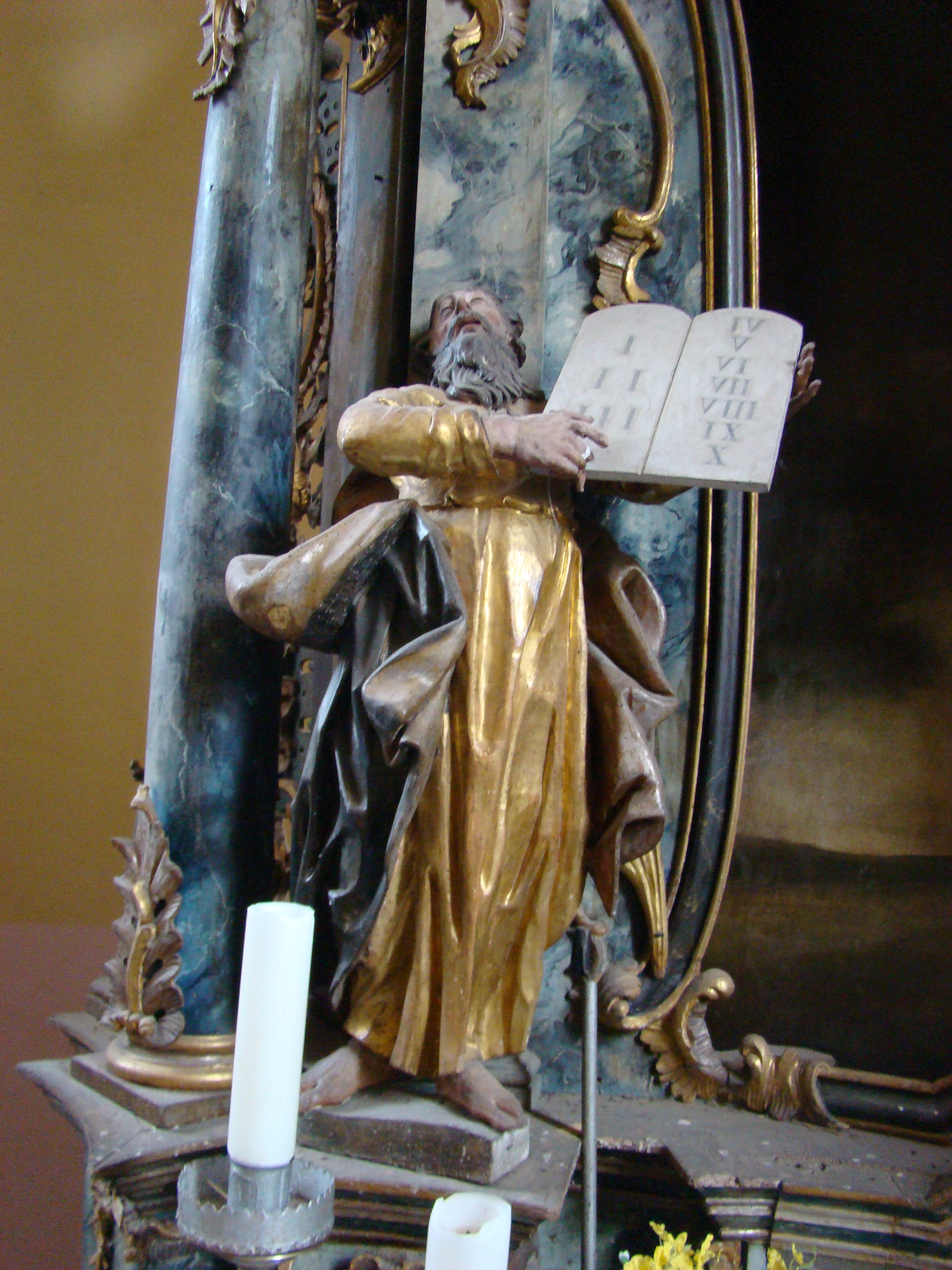 Biserica evanghelică, oraș Miercurea Sibiului, județul Sibiu 01